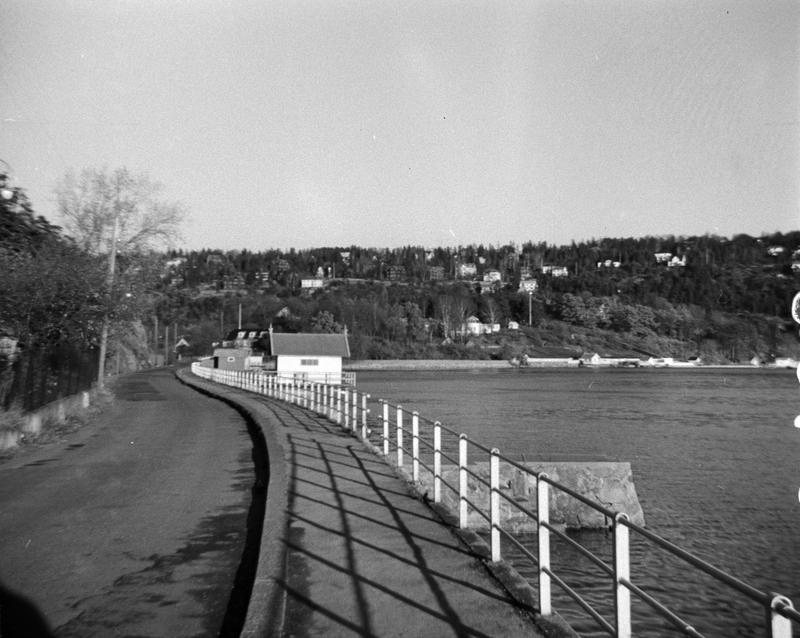 Ormsundveien sett mot Bekkelaget. Paddehavet til høyre.